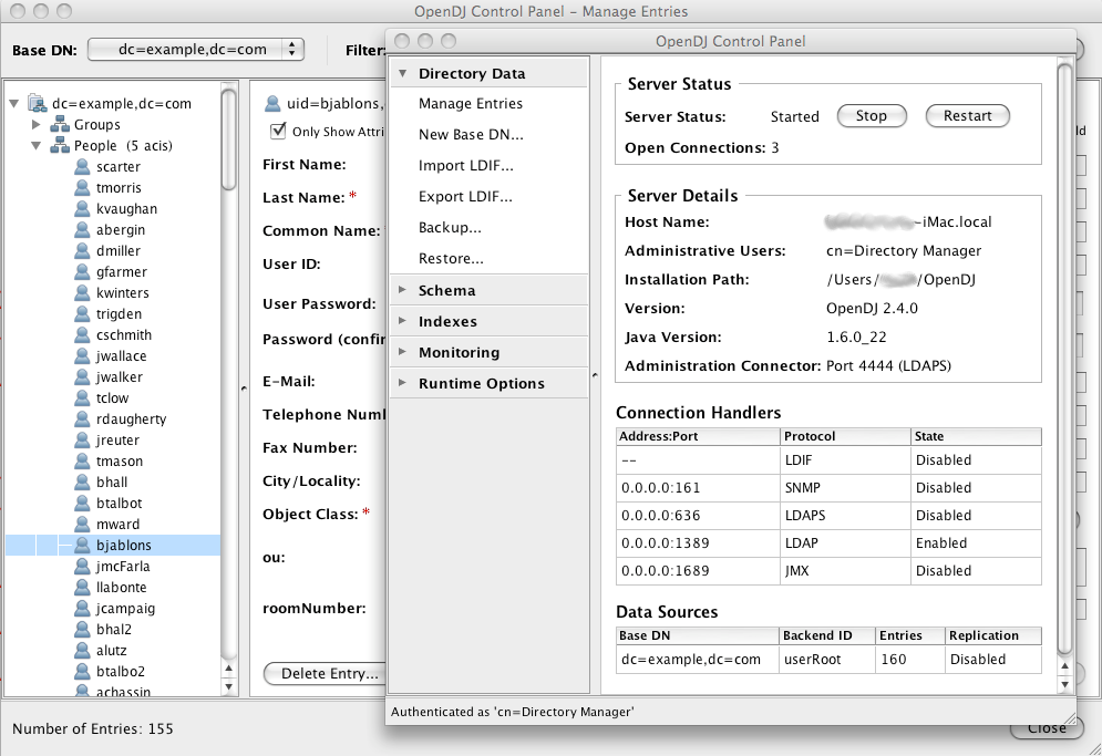 OpenDJ 2.4 Control Panel